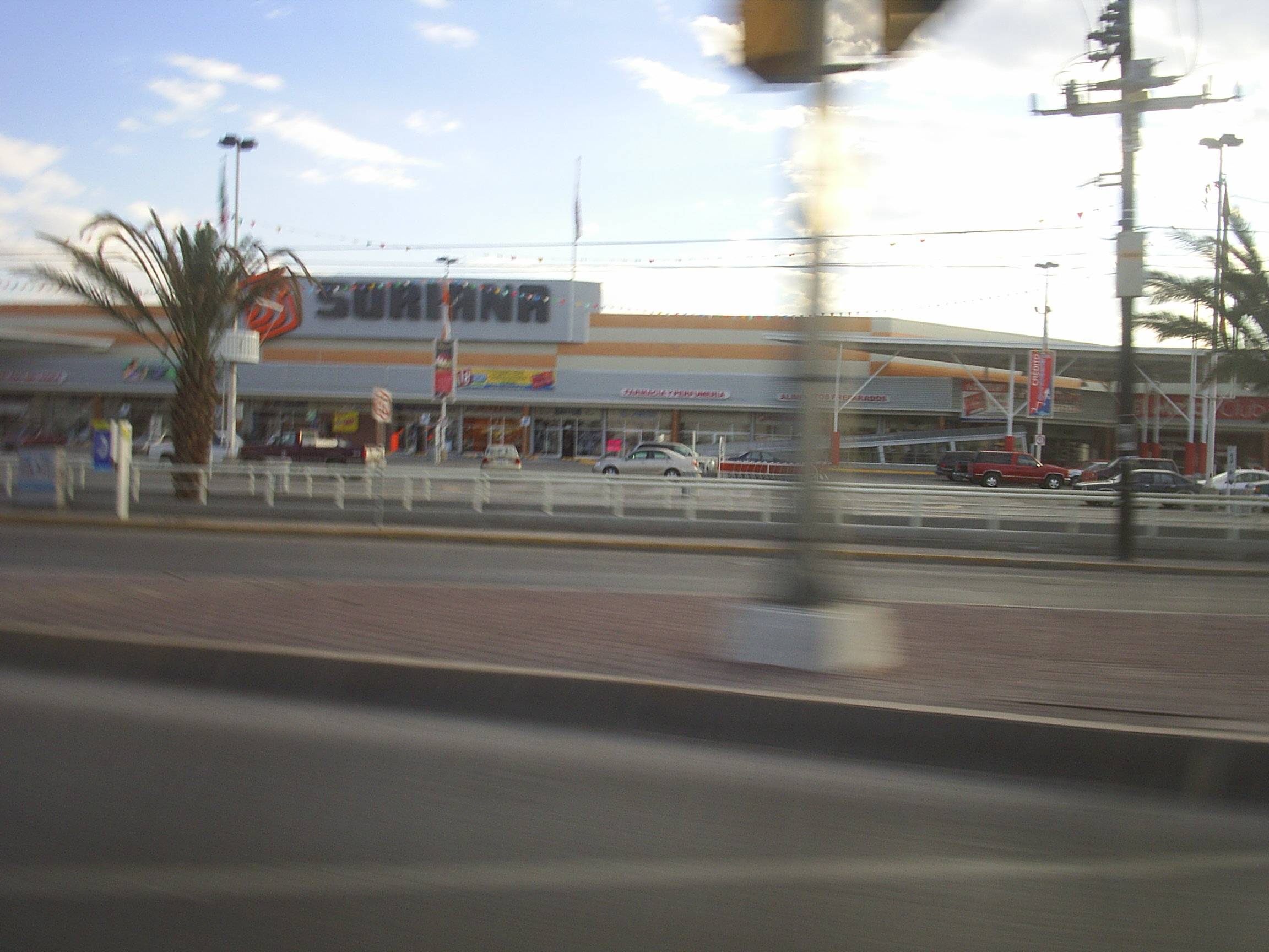 Soriana Plus Store. Establecimiento Soriana Plus. Author/Autor: Alx 91